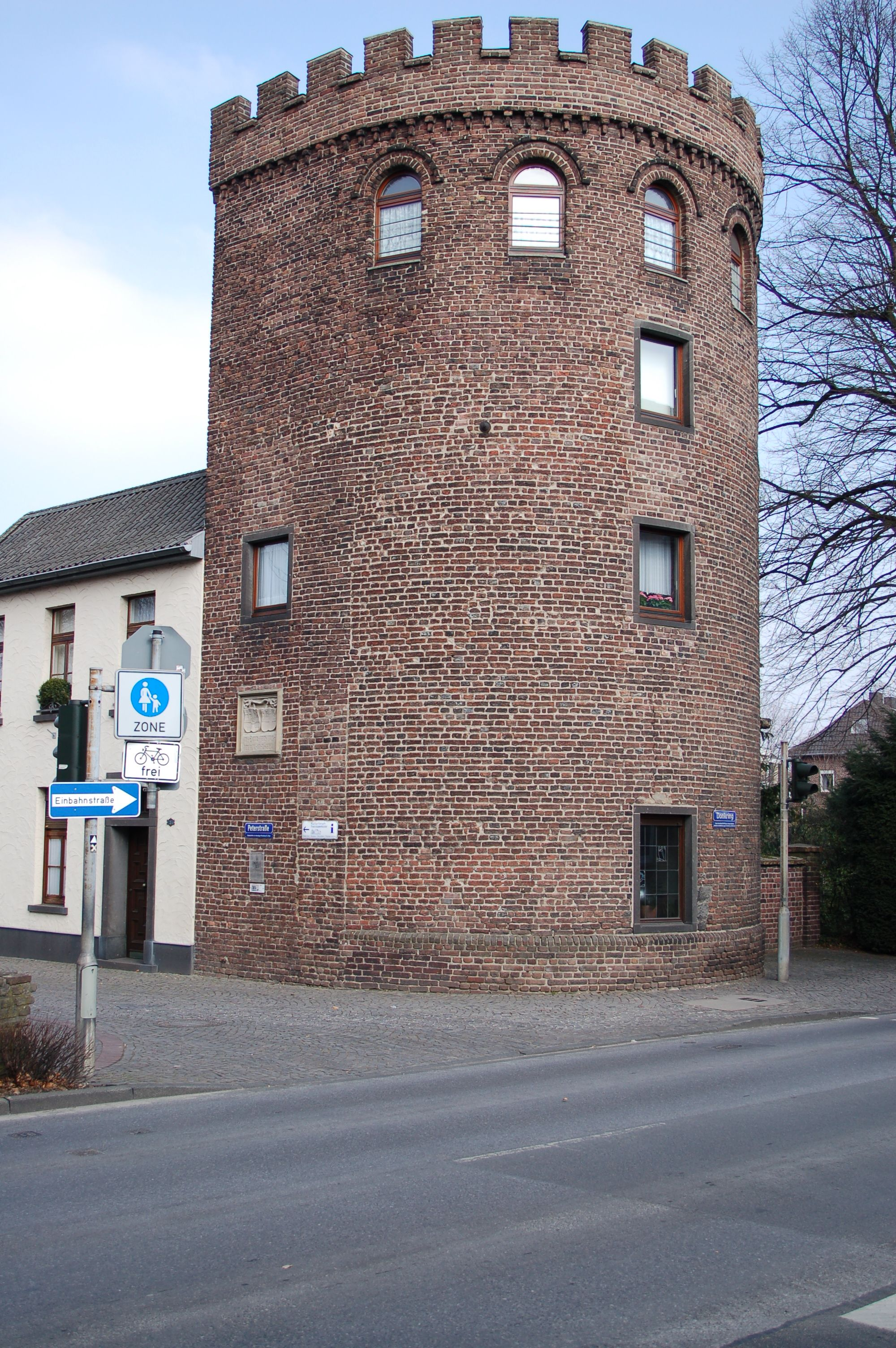 Der Peterturm in Kempen, die letzten Reste des Petertores